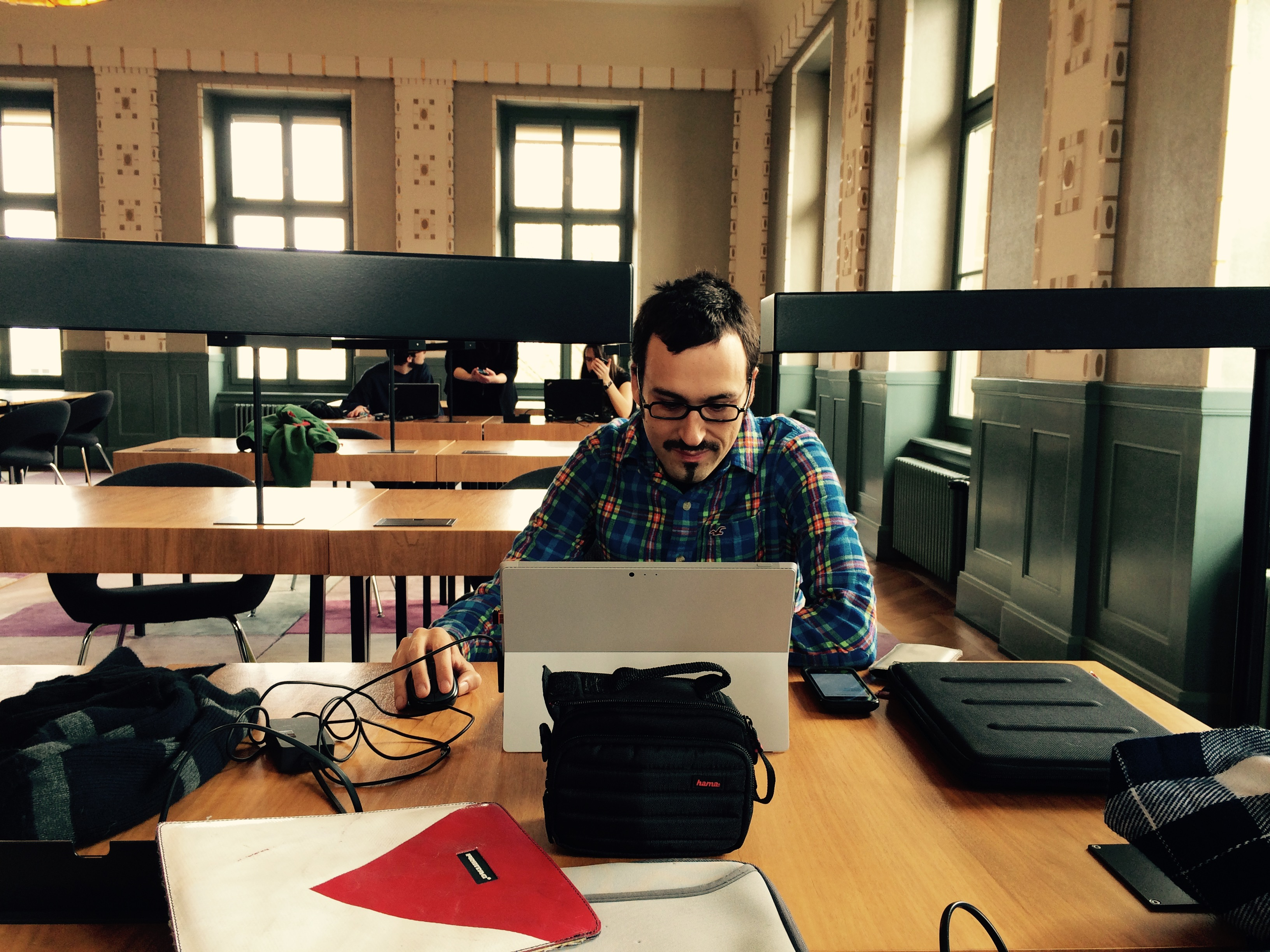 Offenes Editieren Kantonsbibliothek Thurgau 14.02.2015